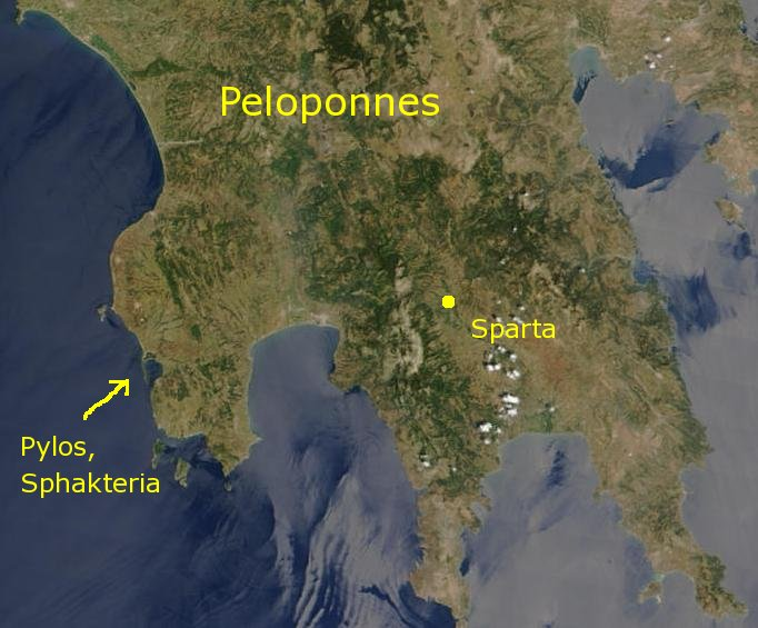 Sphakteria ist die undeutlich zu erkennende schmale Insel vor der Bucht